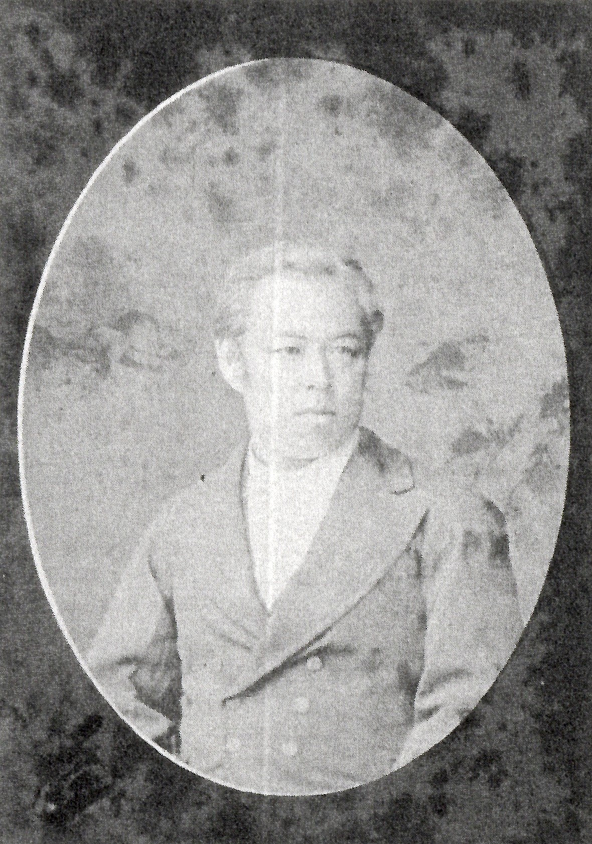 大和柳本藩主織田信成の肖像写真。